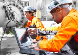 Ensayos con corrientes inducidas